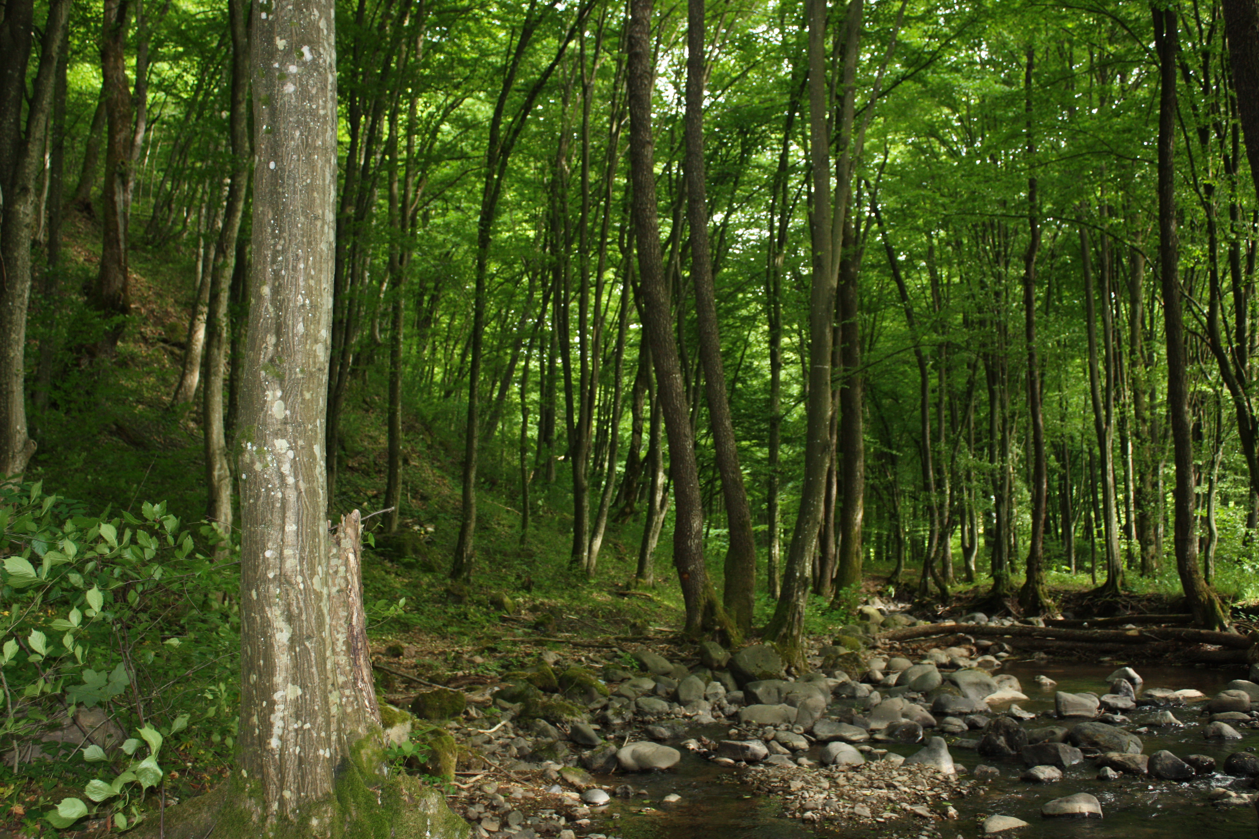 ДП «Хустське ЛДГ», Хустський р-н, Хустське л-во, урочище «Городилів»